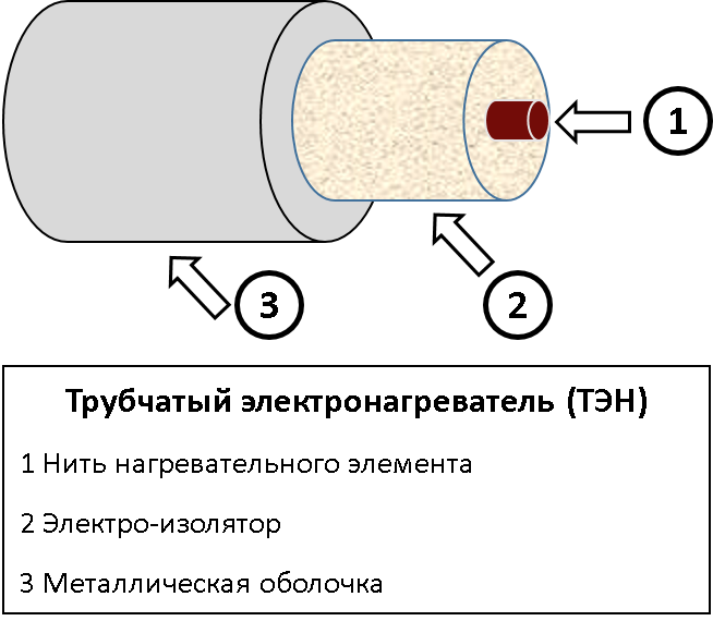 Иллюстрация трубчатого электро-нагревателя (ТЭН) с выделением элементов и их описанием